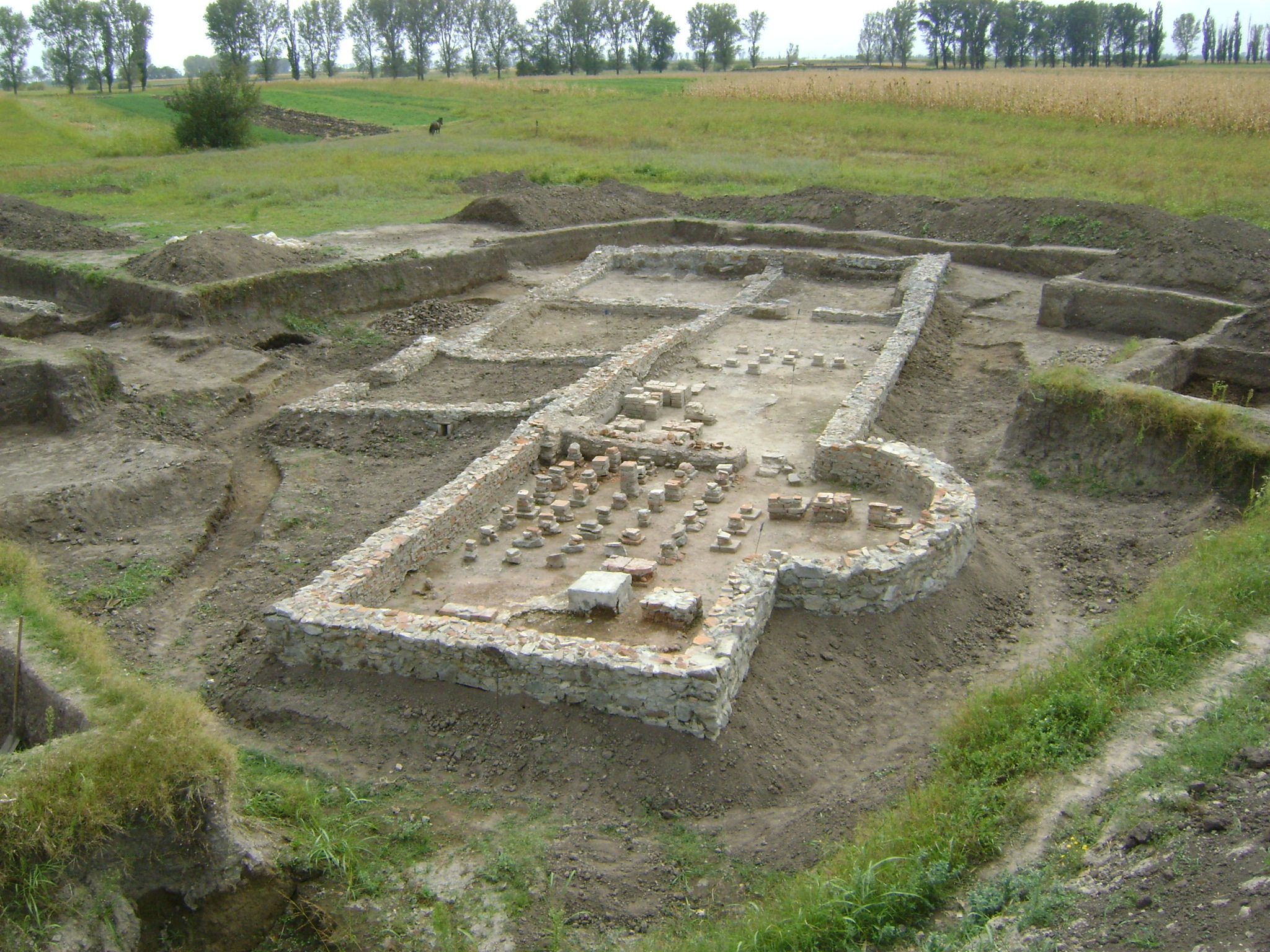 Situl arheologic de la Cioroiul Nou